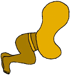 Glifo de Huazalingo, Hidalgo